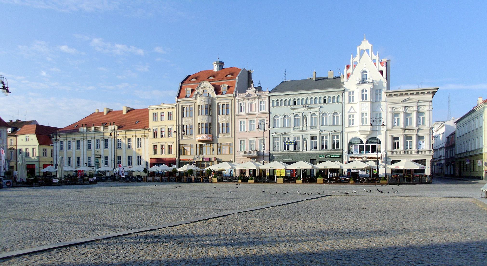 Bydgoszcz, dzielnica Starego Miasta, 1238